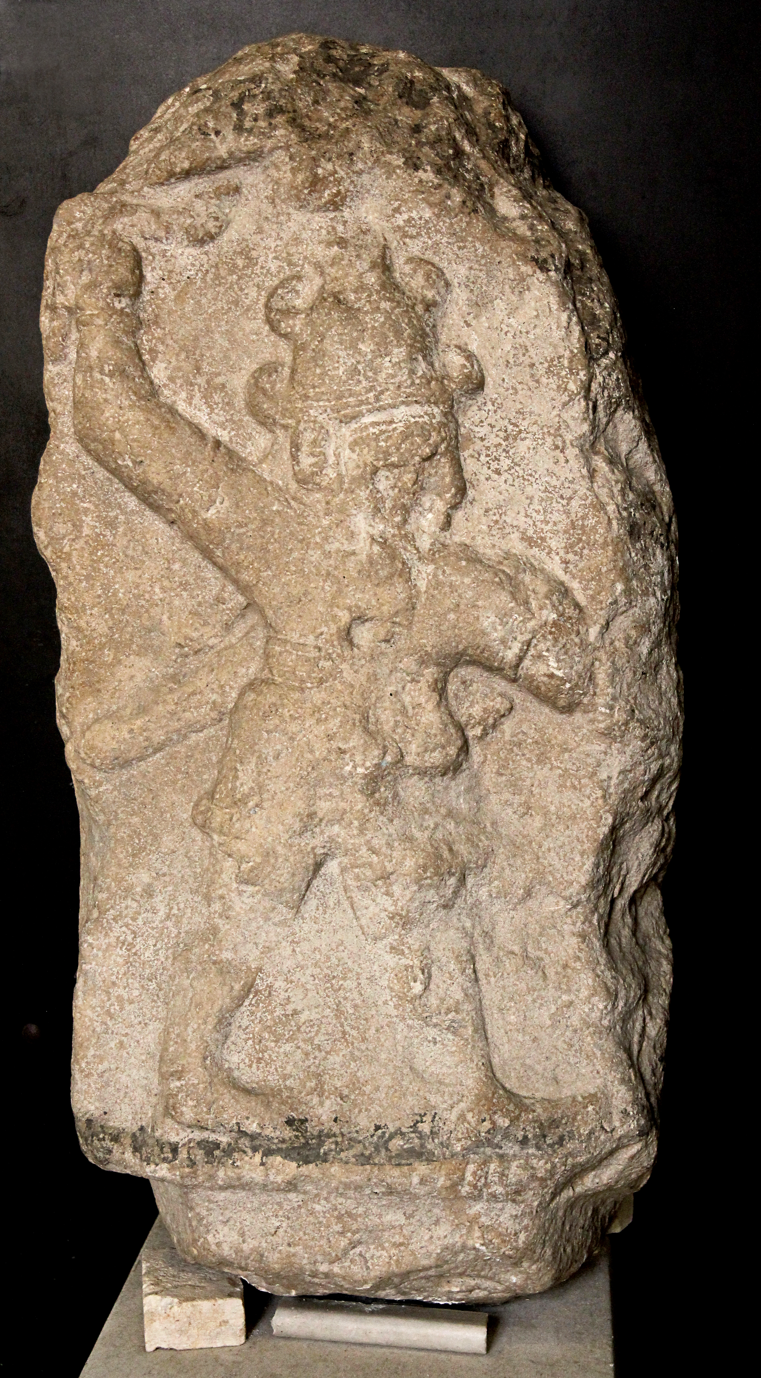 Stele Adıyaman 2 des hethitischen Wettergottes im Archäologischen Museum Adıyaman, Türkei